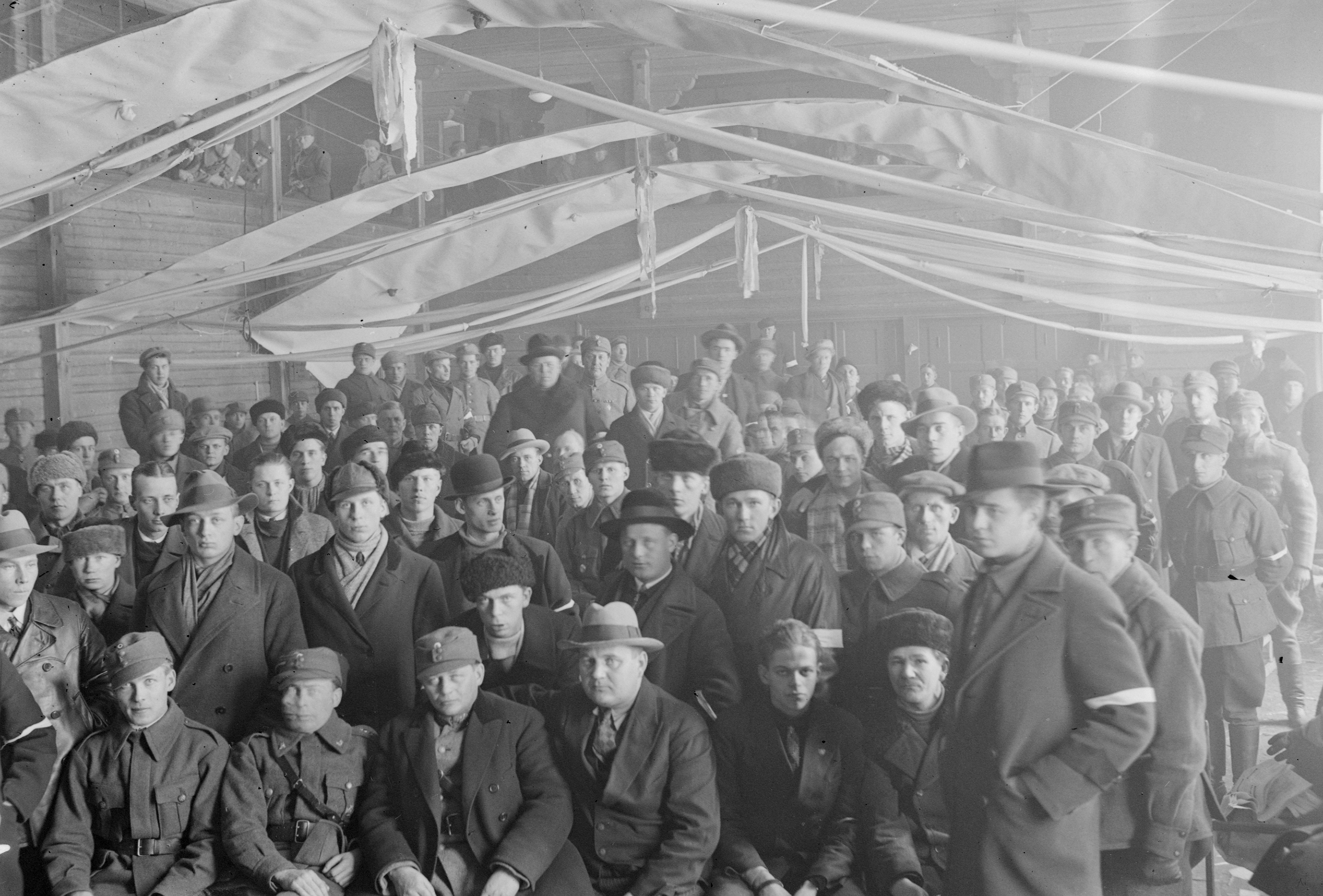 Mäntsälän kapinallisia Mäntsälän suojeluskuntatalolla kapinan aikaan. Museovirasto - Musketti.